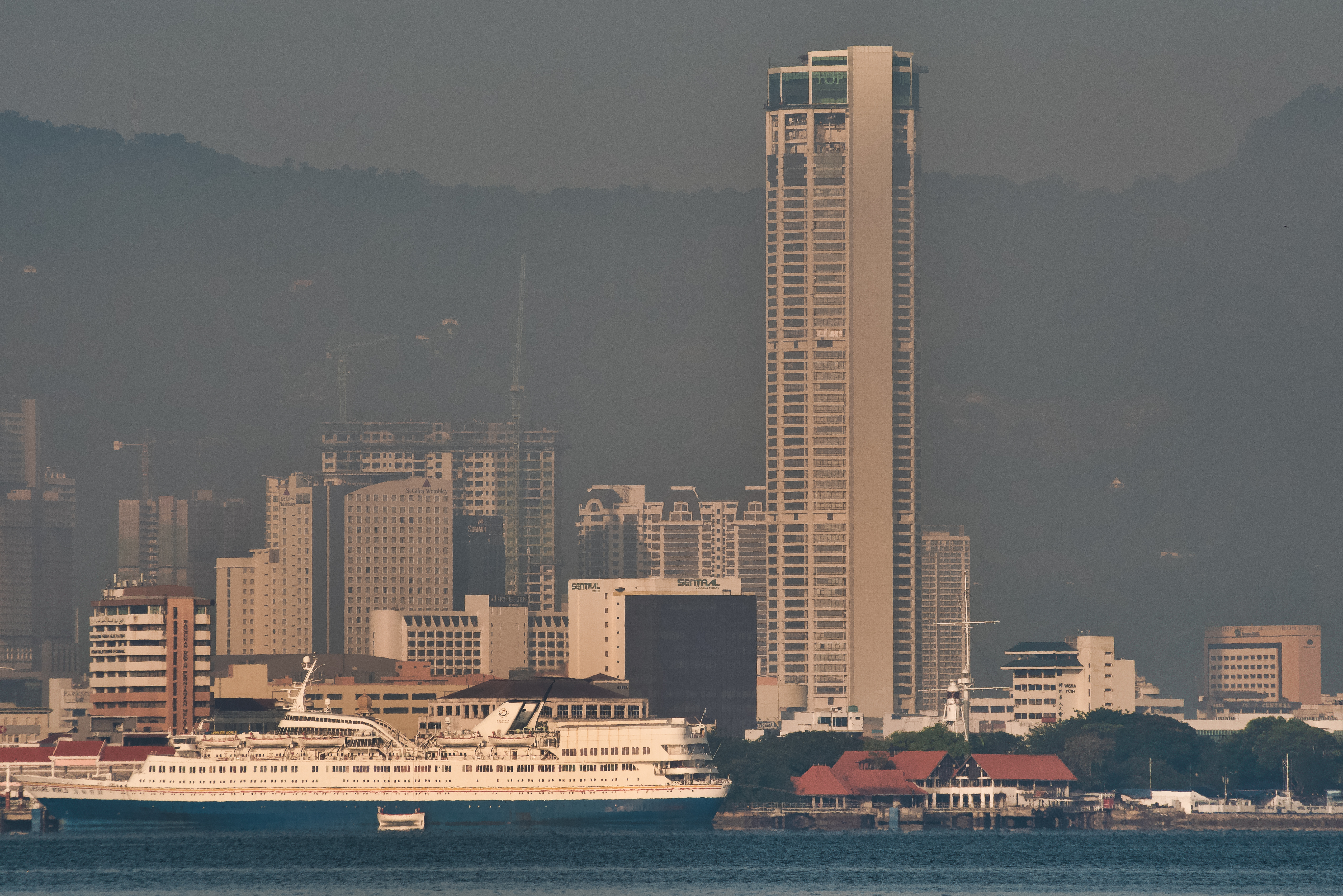 Contax CZ 100-300mm